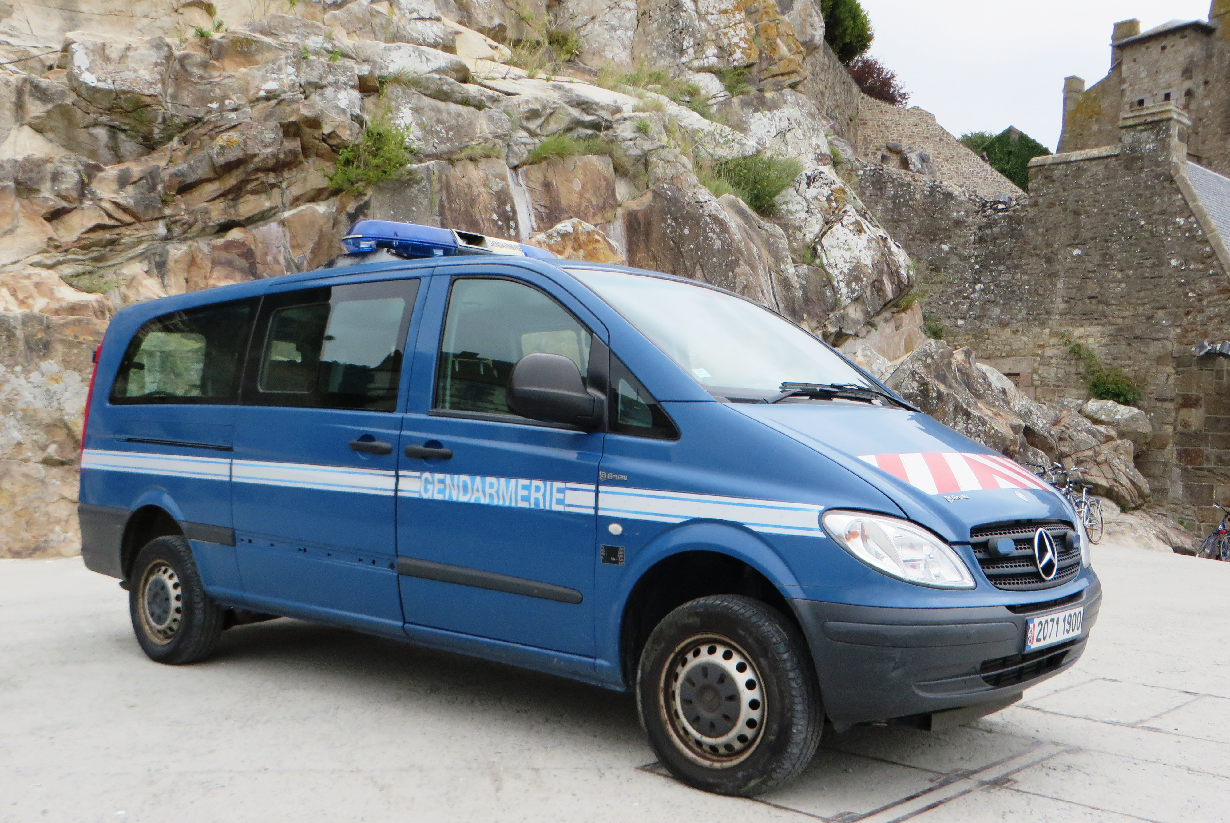 Franse politie (French gendarmerie)